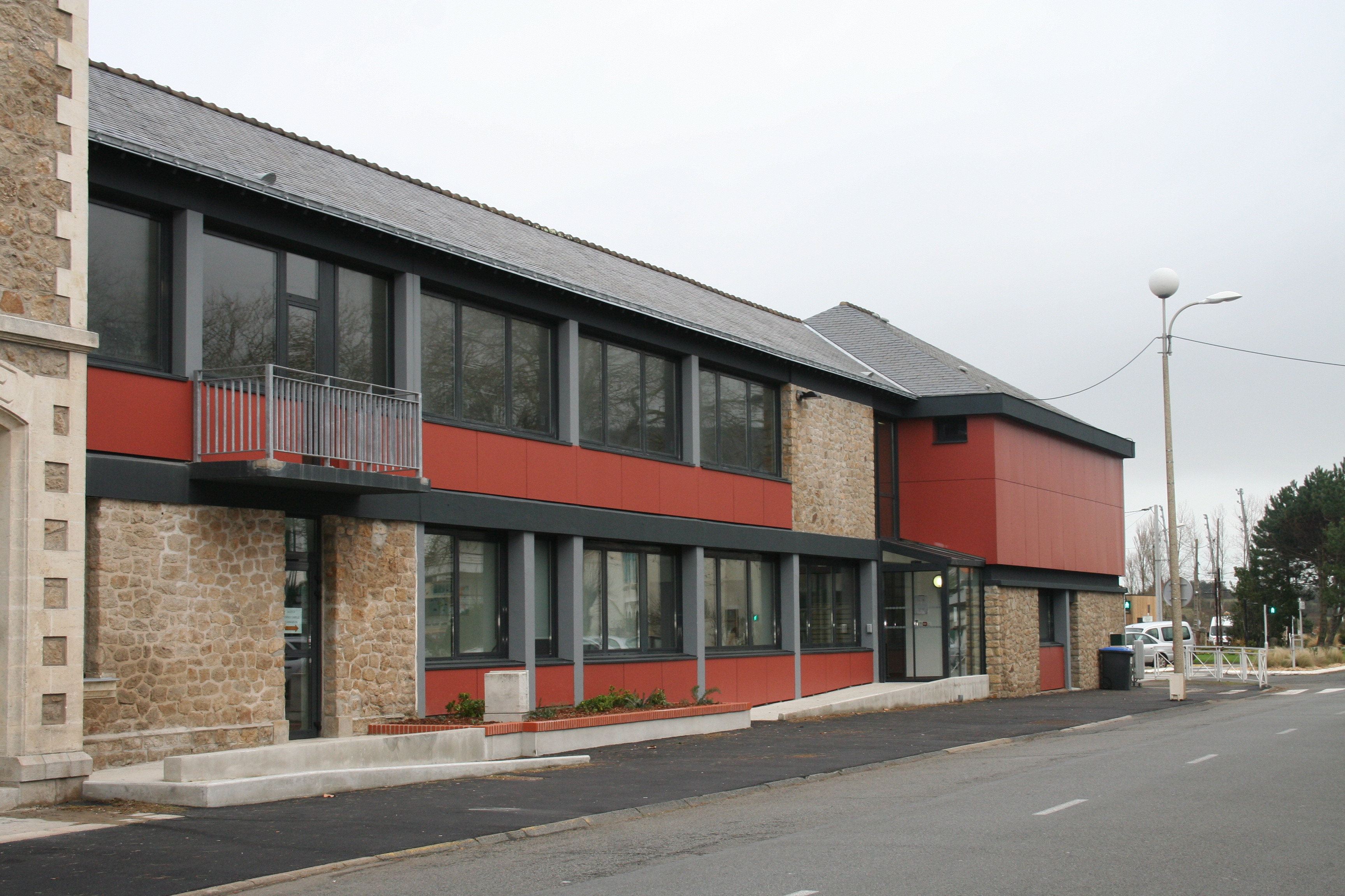 ECF - Espace Camille Flammarion, qui abrite la maison des associations de Pornichet